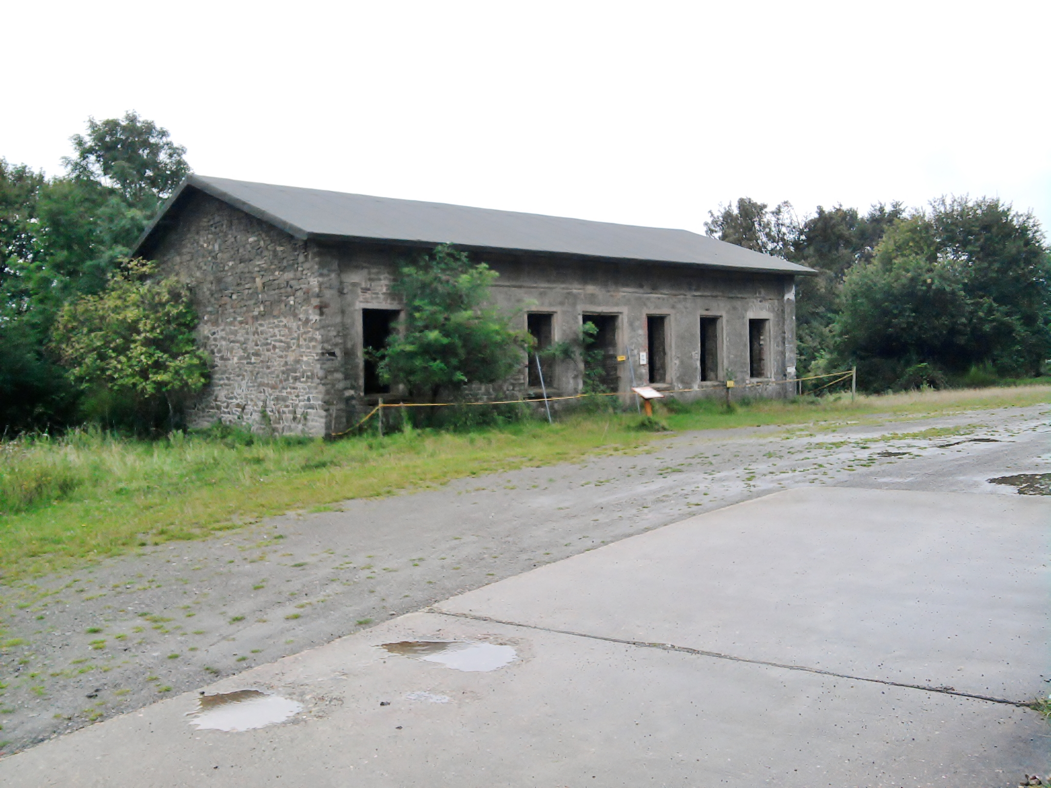 Gebäuderuine der ehemaligen 2 geschossigen Volksschule im Eifeldorf Wollseifen im August 2014, vor Beginn der Restaurierung